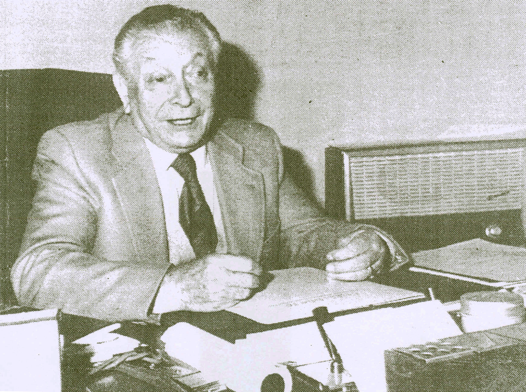 Nino Miglierina, fondatore dell'associazione La Famiglia Bustocca.